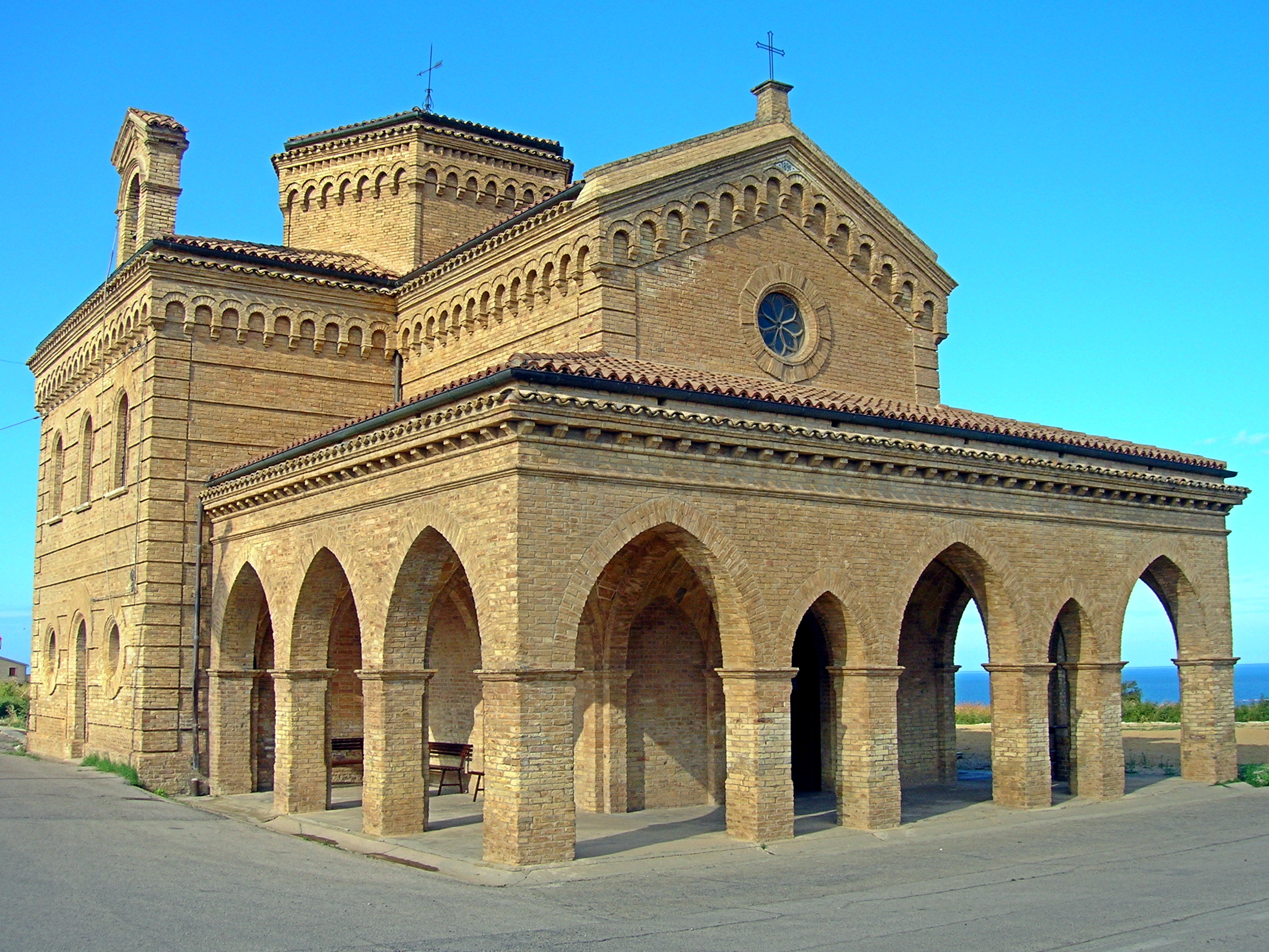 Facciata della Chiesa di Santa Maria di Punta Penna, Vasto (CH)